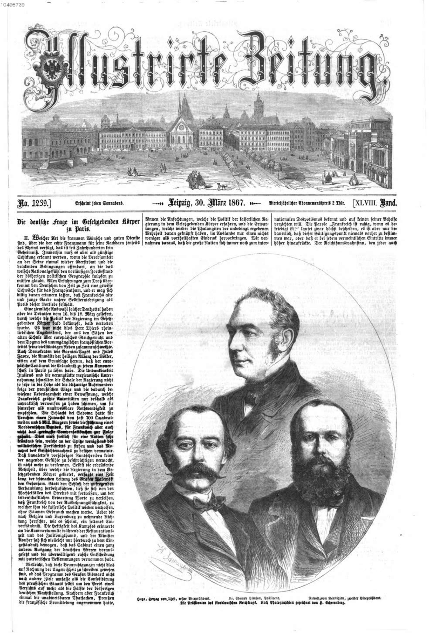 Leipziger Illustrirte Zeitung, 30. März 1867. Präsidenten des Reichstags.